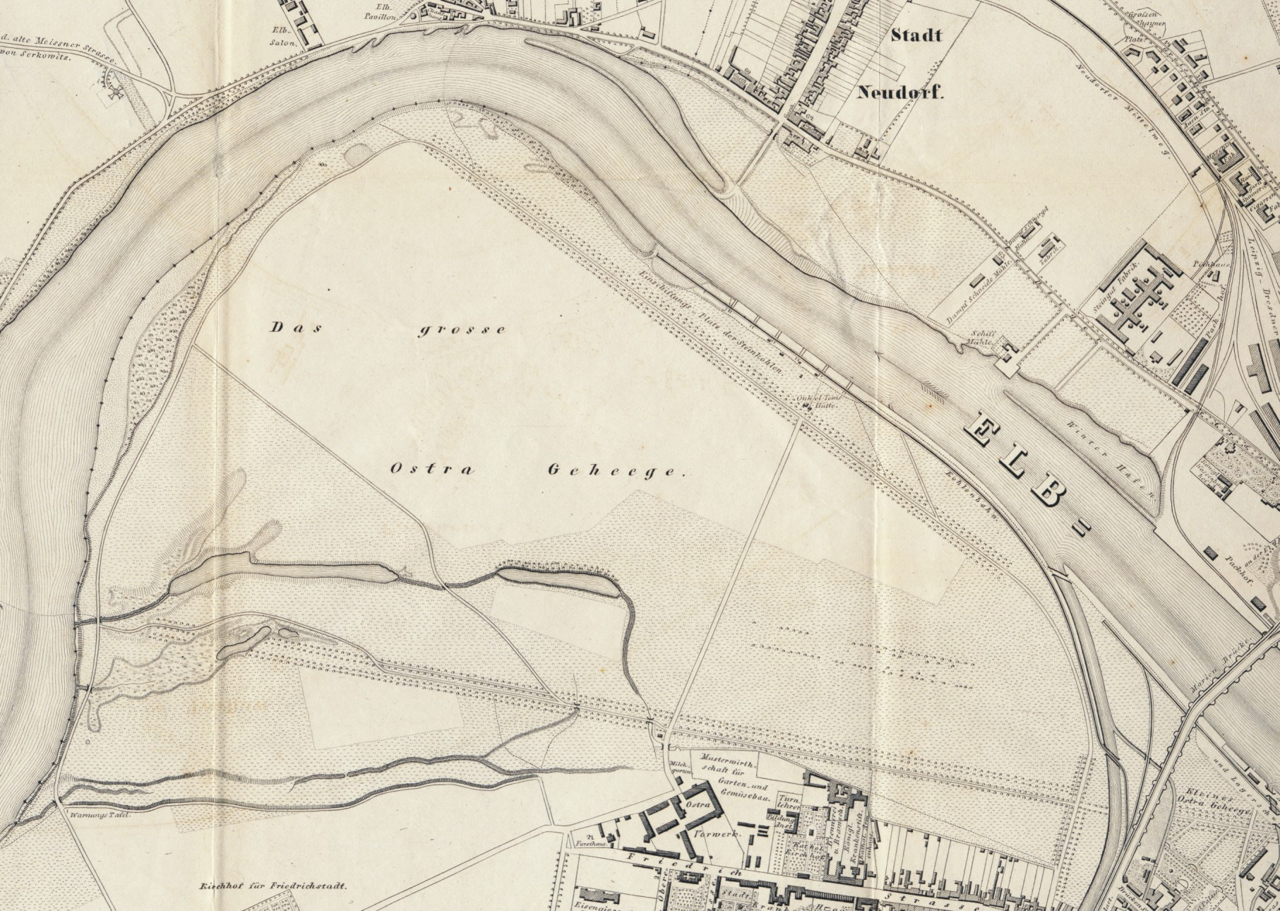 Detail aus Plan von Dresden (Stich: Julius Keyl, Druck: Blochmann und Sohn) 1863